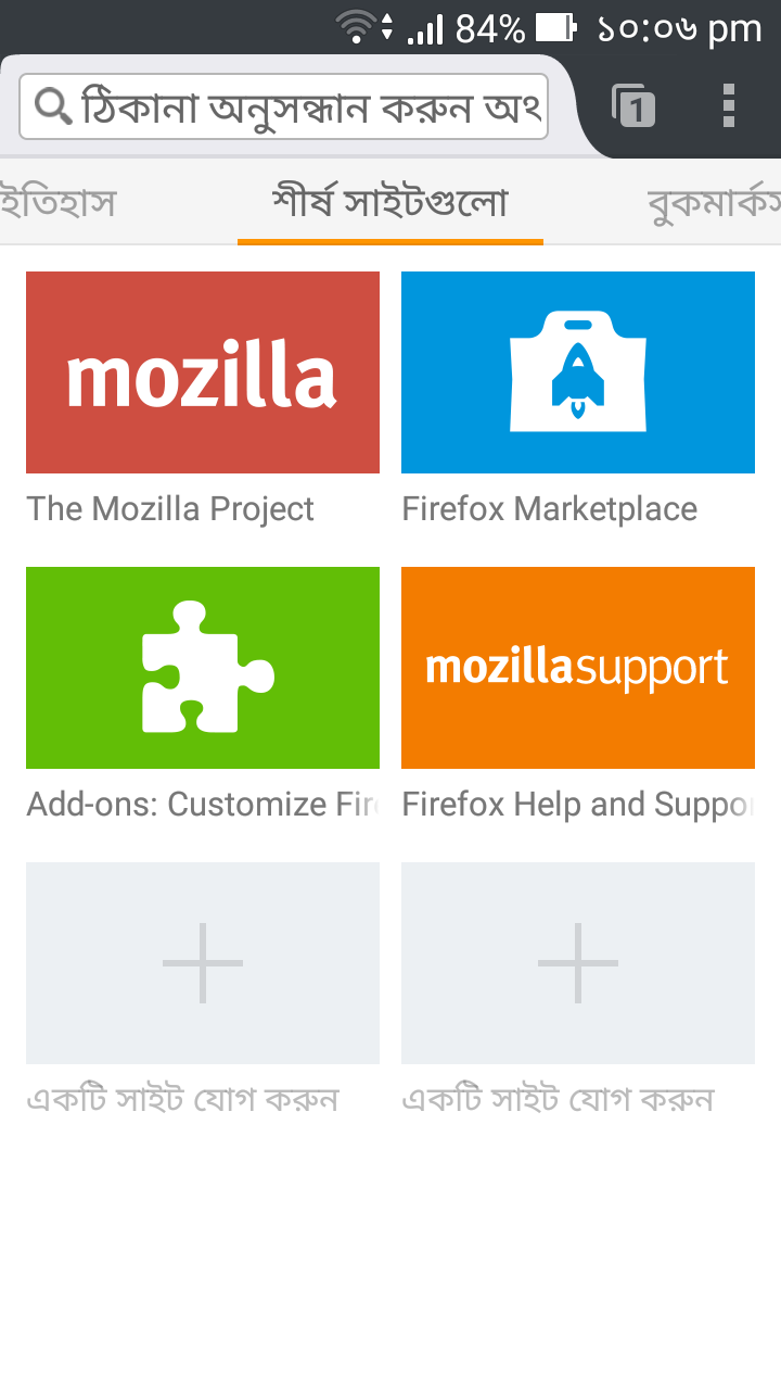 অ্যান্ড্রয়েডে ফায়ারফক্স ৩৮ (ভাষা: বাংলা)